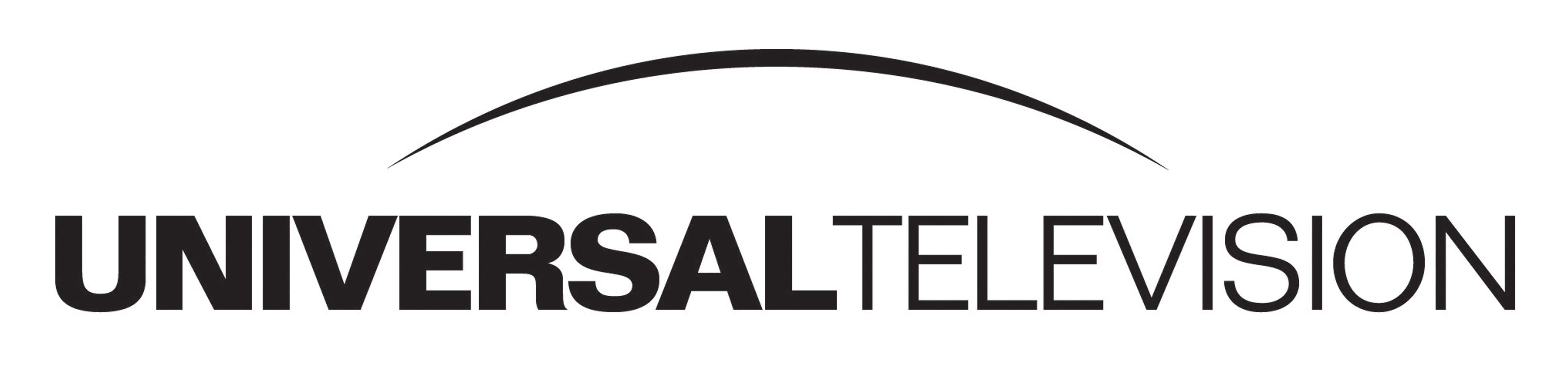 Logo von Universal Television